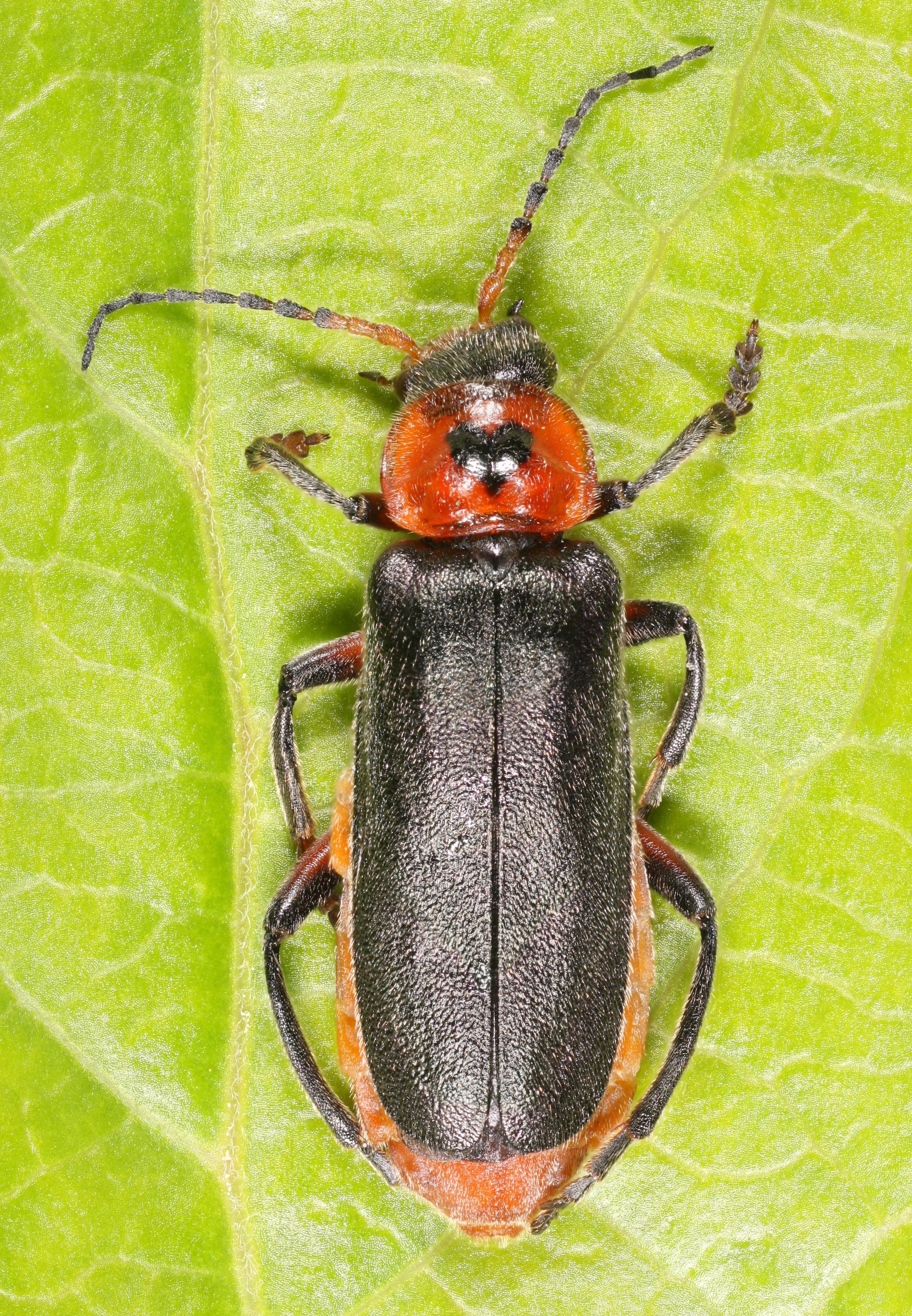 Bløtvingen Cantharis rustica har en flekk på ryggskjoldet som noen ganger har form av et hjerte.